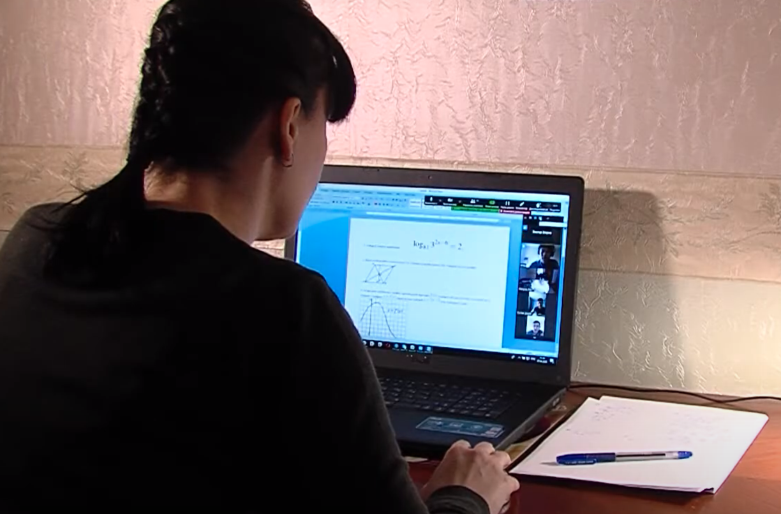 Учитель математики химкинской школы № 25 Юлия Аникина проводит урок алгебры у 11 класса во время пандемии COVID-19. На экране компьютера видны типовой задания ЕГЭ по математике